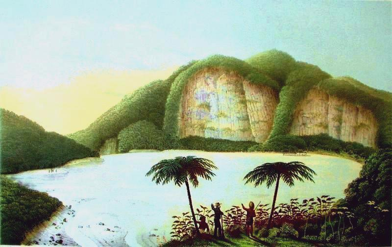 Kawah Putih. Aus dem Java-Album